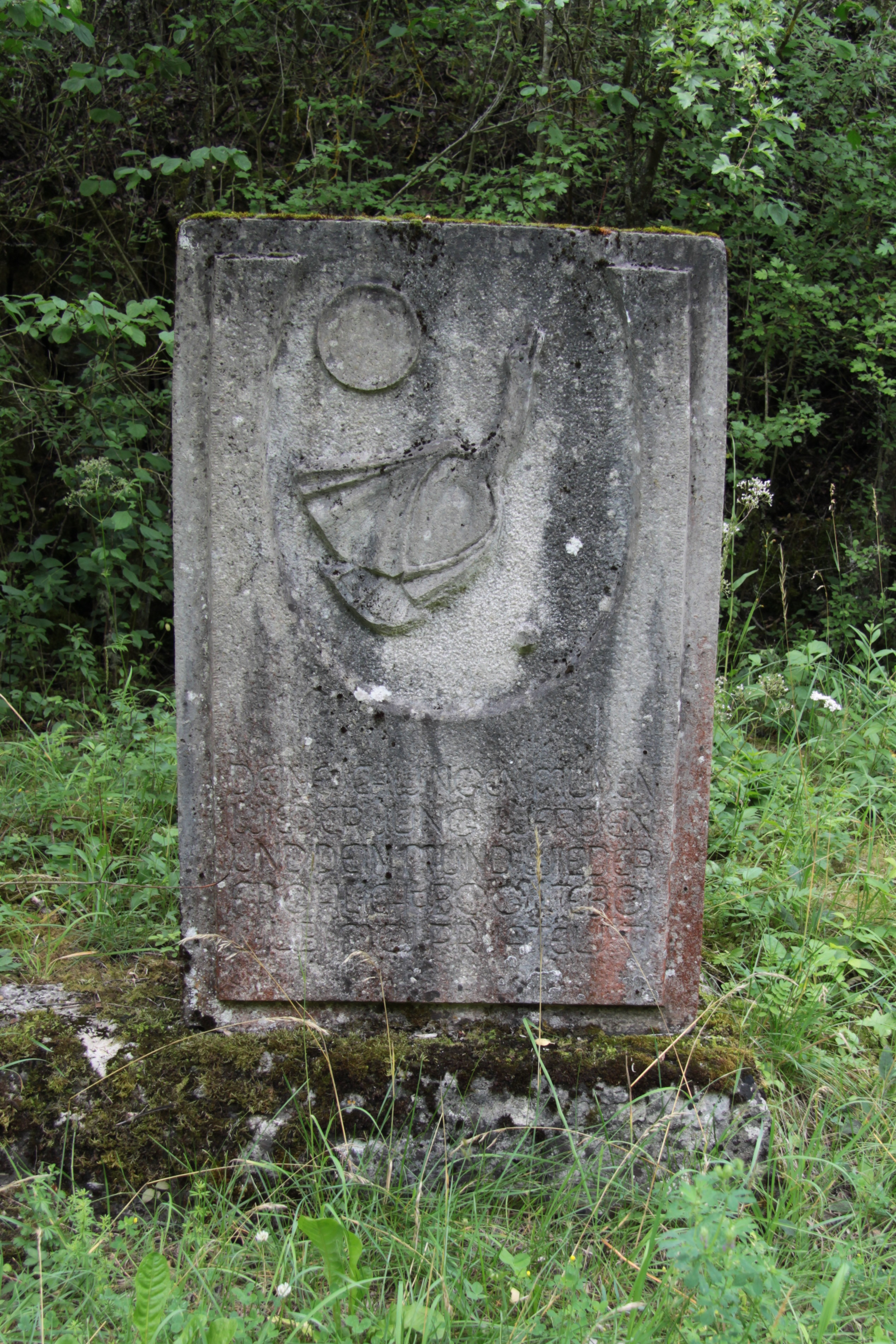 Wegstein auf dem Waldweg zu den Skulpturen des 1. Internationalen Bildhauersymposions der Bundesrepublik 1961